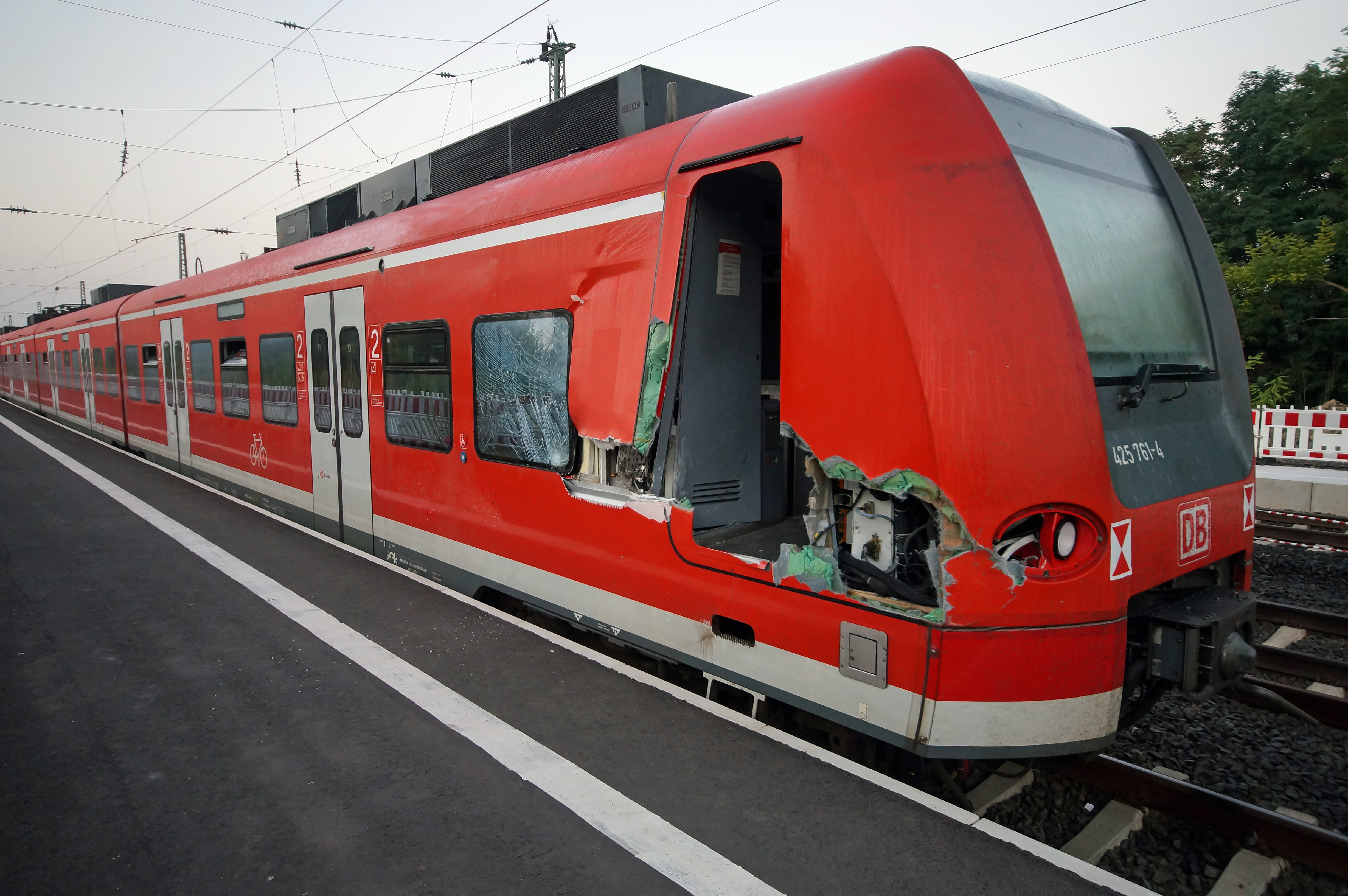 Der fotografierte Triebzug 425 761-4 der DB-Baureihe 425 (1999) stieß am Nachmittag des 16. September 2014 gegen 17:00 Uhr auf der Bahnstrecke Mainz–Mannheim auf der Höhe des gerade in Bau befindlichen Haltepunkts Dienheim gegen die Schaufel eines Baggers. Der Triebzug war als Regionalbahn 38756 auf dem Weg Richtung Mainz. Zum Zeitpunkt der Aufnahme steht der Triebzug im Überholgleis des Bahnhofs Guntersblum.